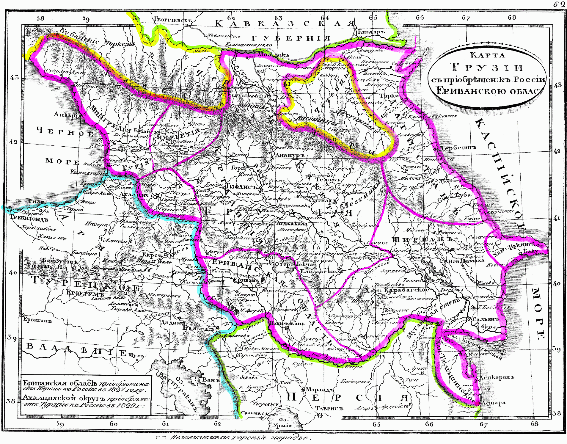 Карта Грузии и Ериванской области, 1835